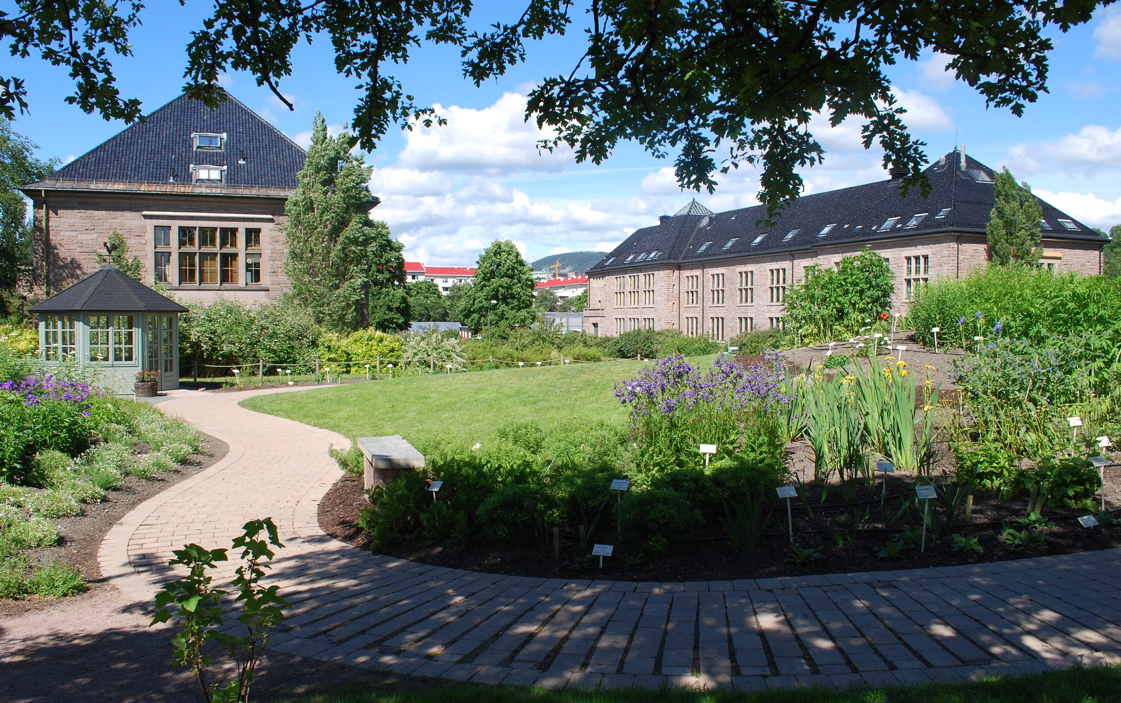 Oldemors have i Botansik hage, Oslo, åpnet i 2008, særlig beregnet for demente